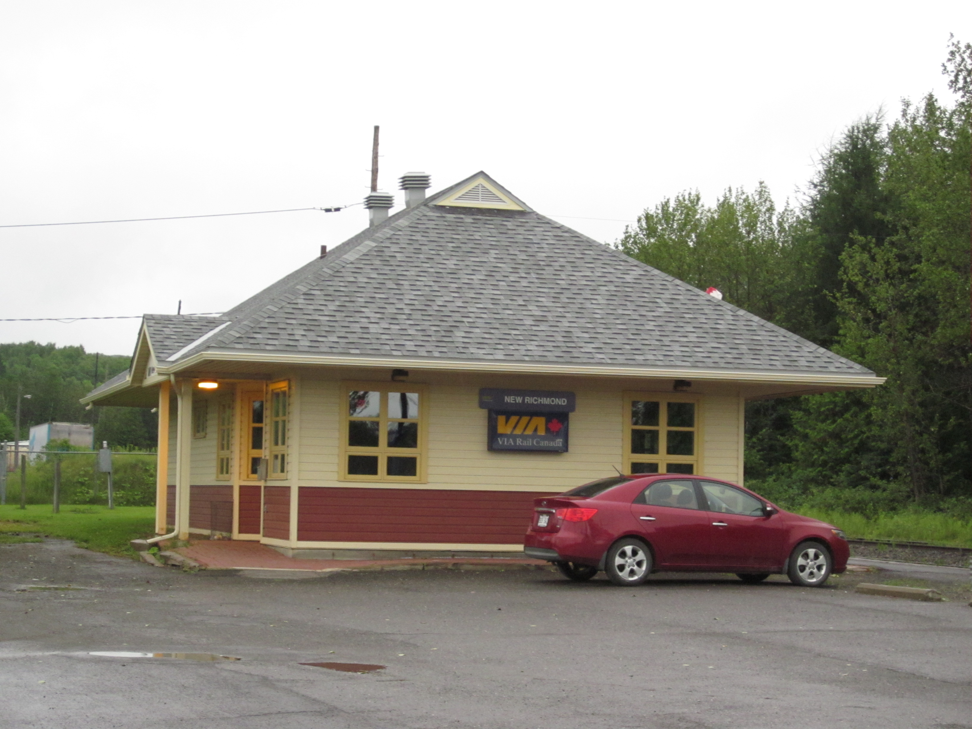 Gare de New Richmond